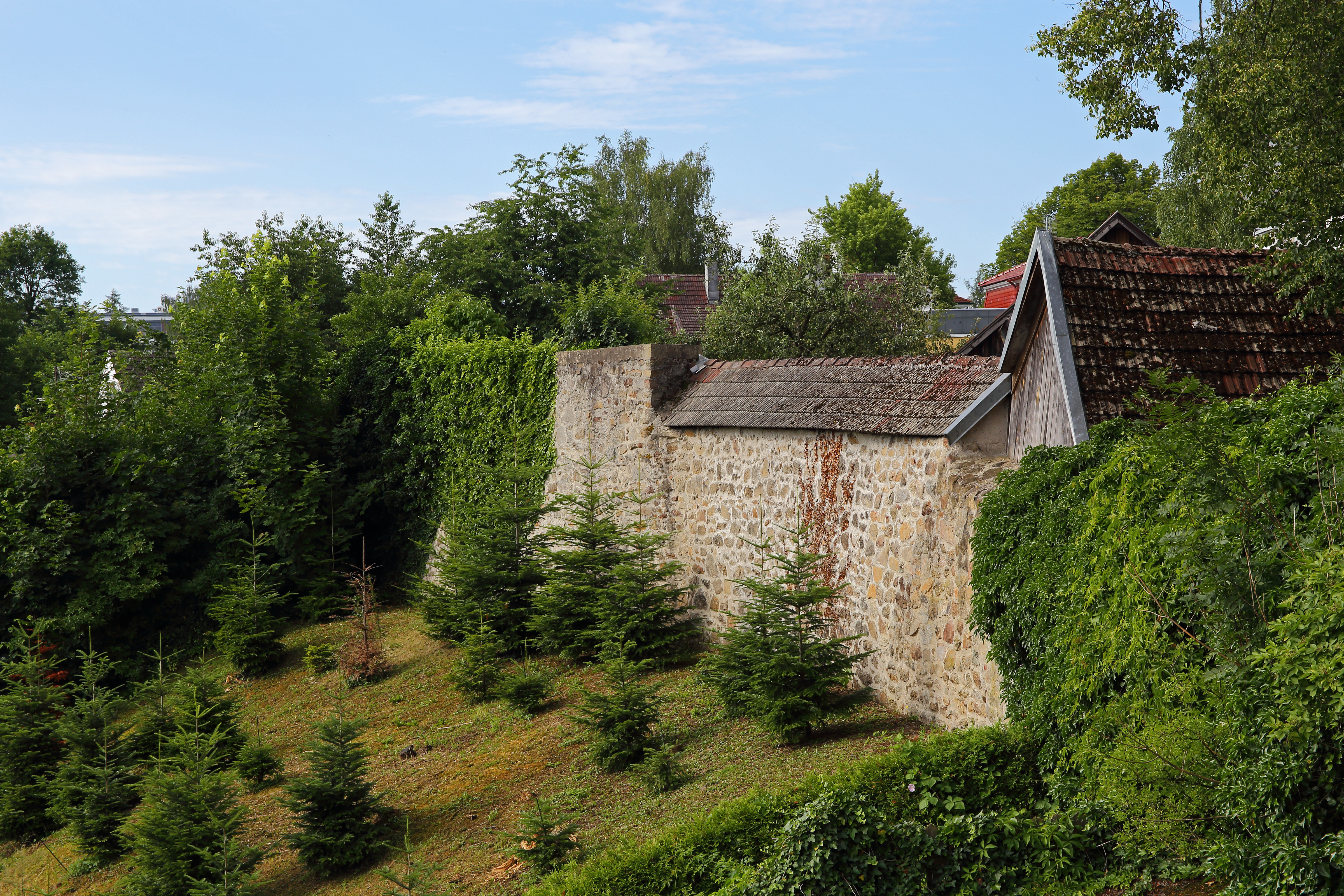 Stadtmauer in Gmünd Stadtplatz 46 GstNr 11